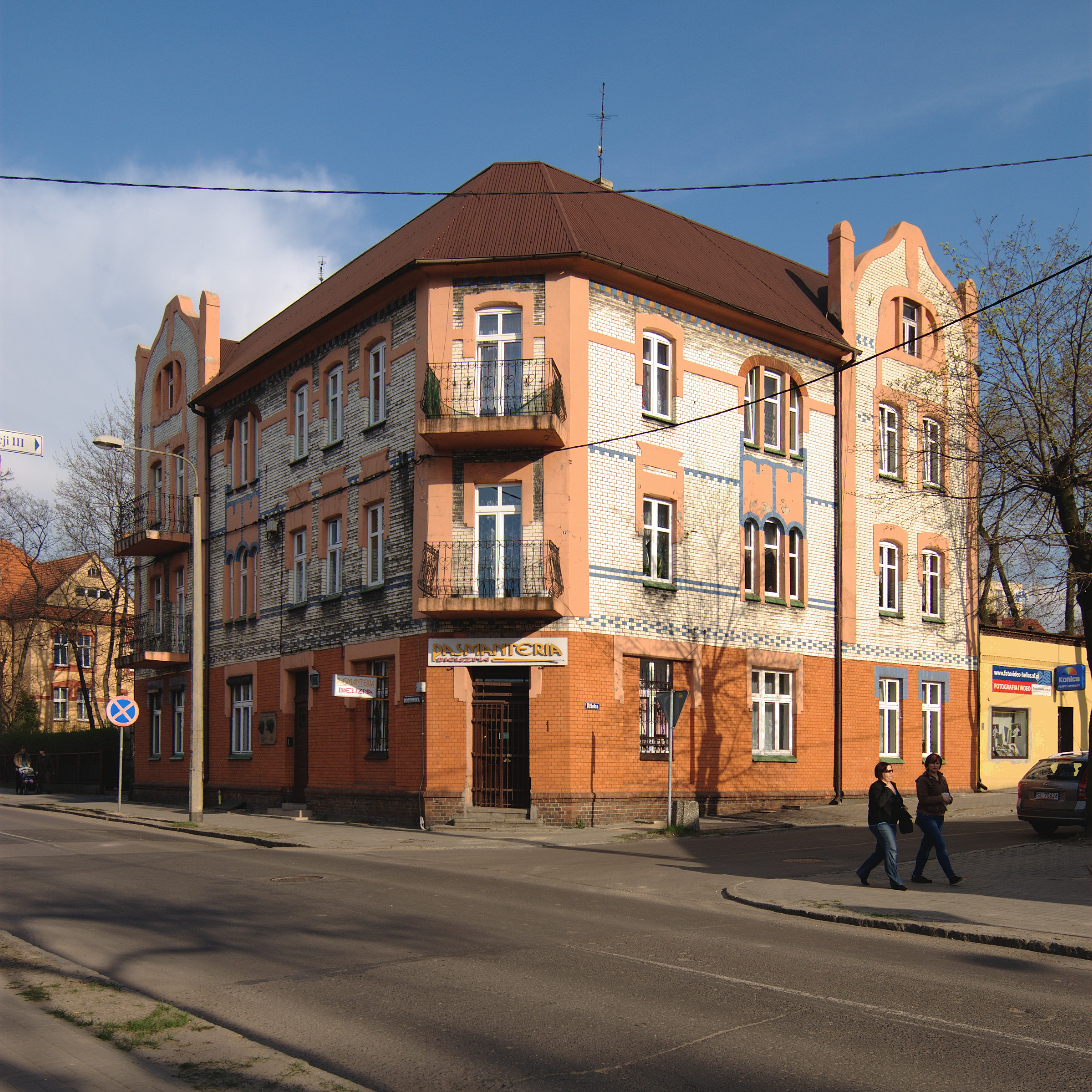 Ruda Śląska, Kochłowice. Budynek Radoszowska 167, w którym w dzieciństwie mieszkali Henryk i Stanisław Bista.